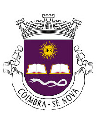 Brasão de Armas da Sé Nova